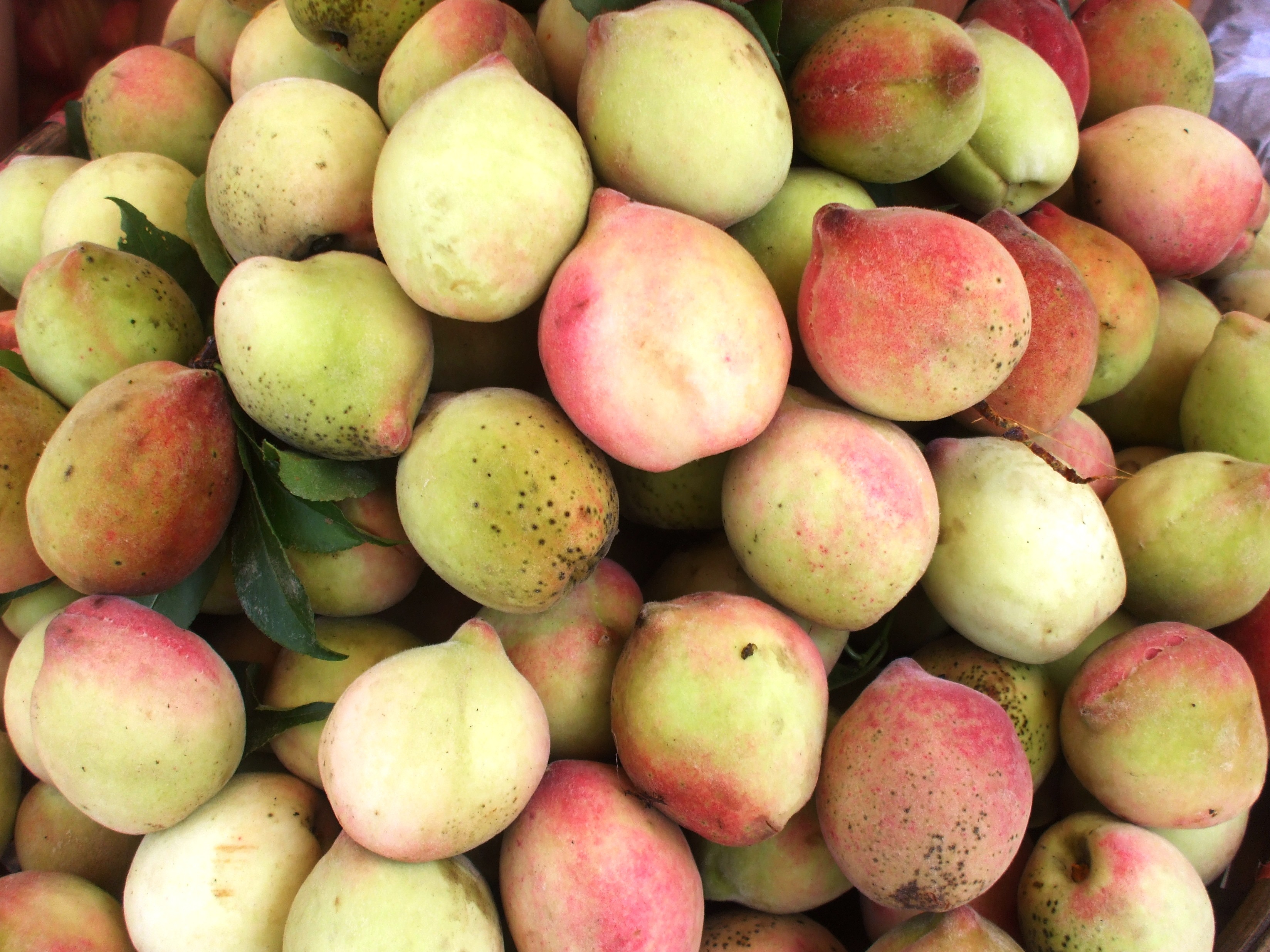 Quả đào Sa Pa (Sa Pa, Lào Cai, Việt Nam).